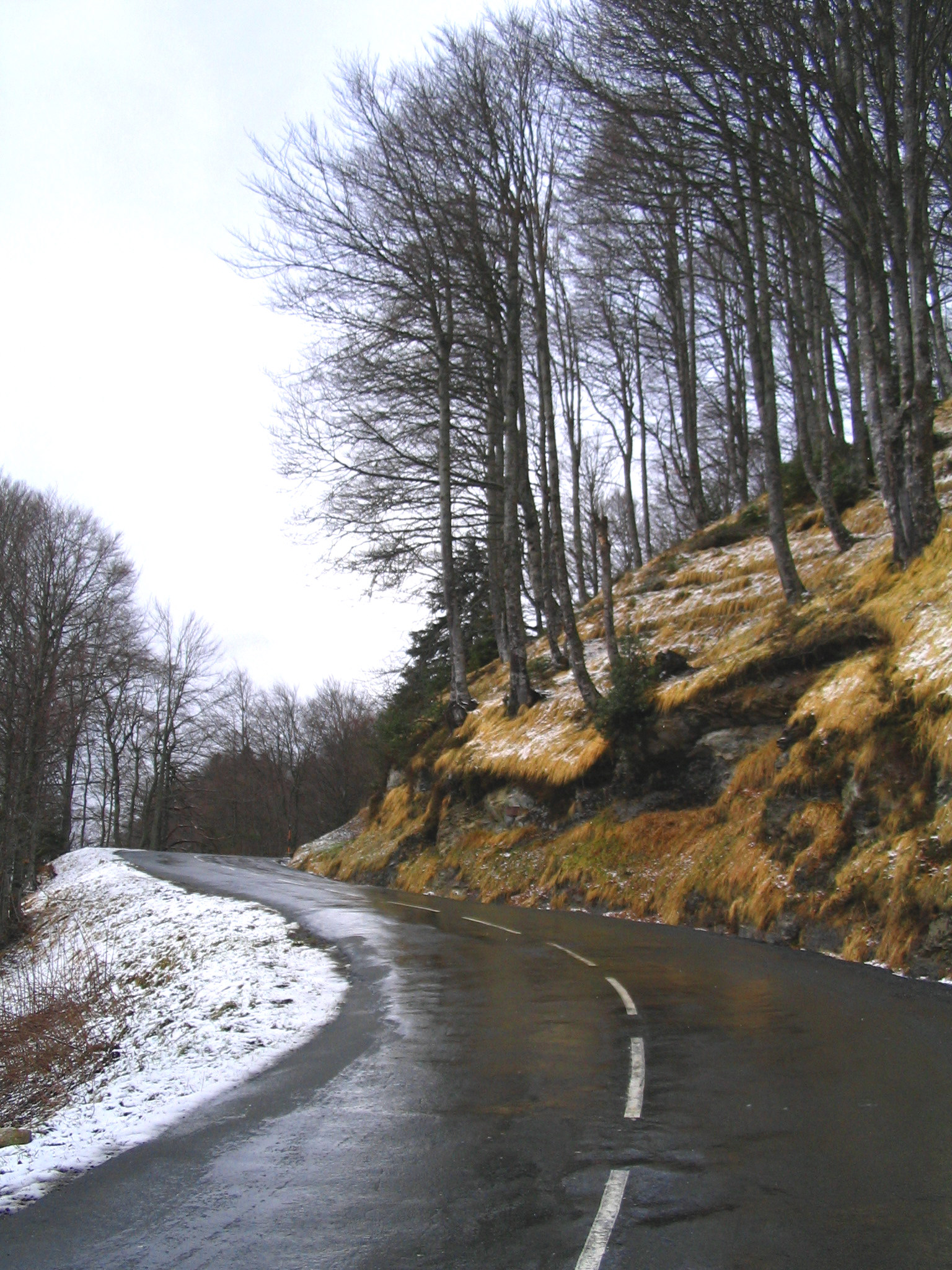 Route du col d'aubisque dite Route Thermale Pyrénées Atlantiques - France Auteur:P Charpiat - 2007